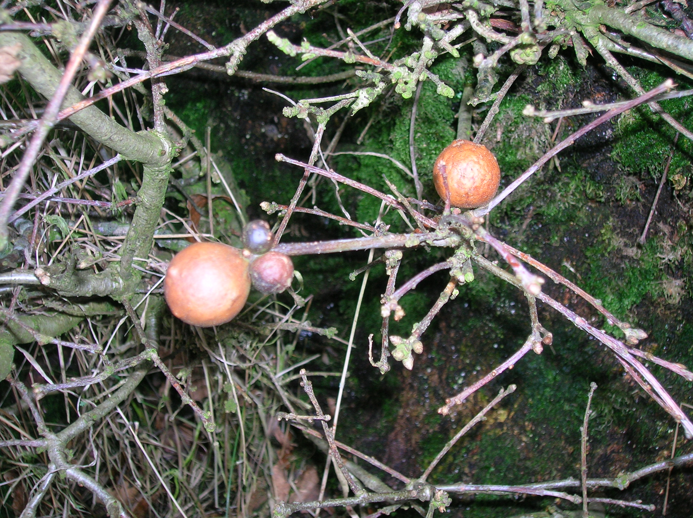 Oak marble galls. causer - Andricus kollari